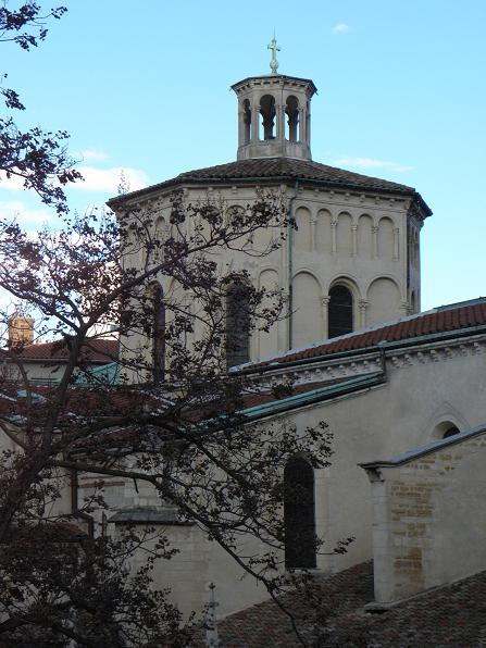 Tour lanterne de l'église St Paul de Lyon